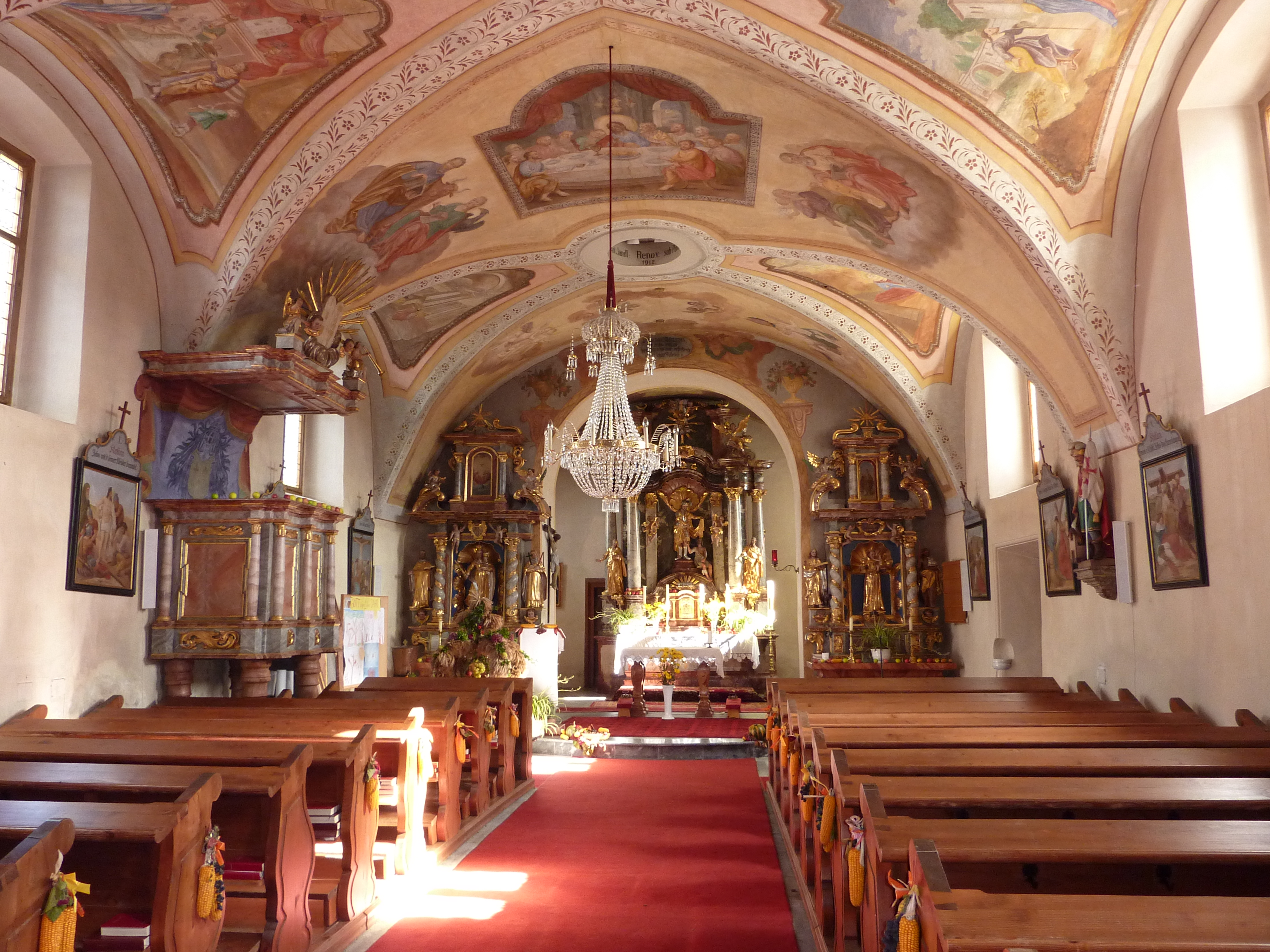 Pfarrkirche hl. Martin, Sankt Martin am Wöllmißberg, Steiermark